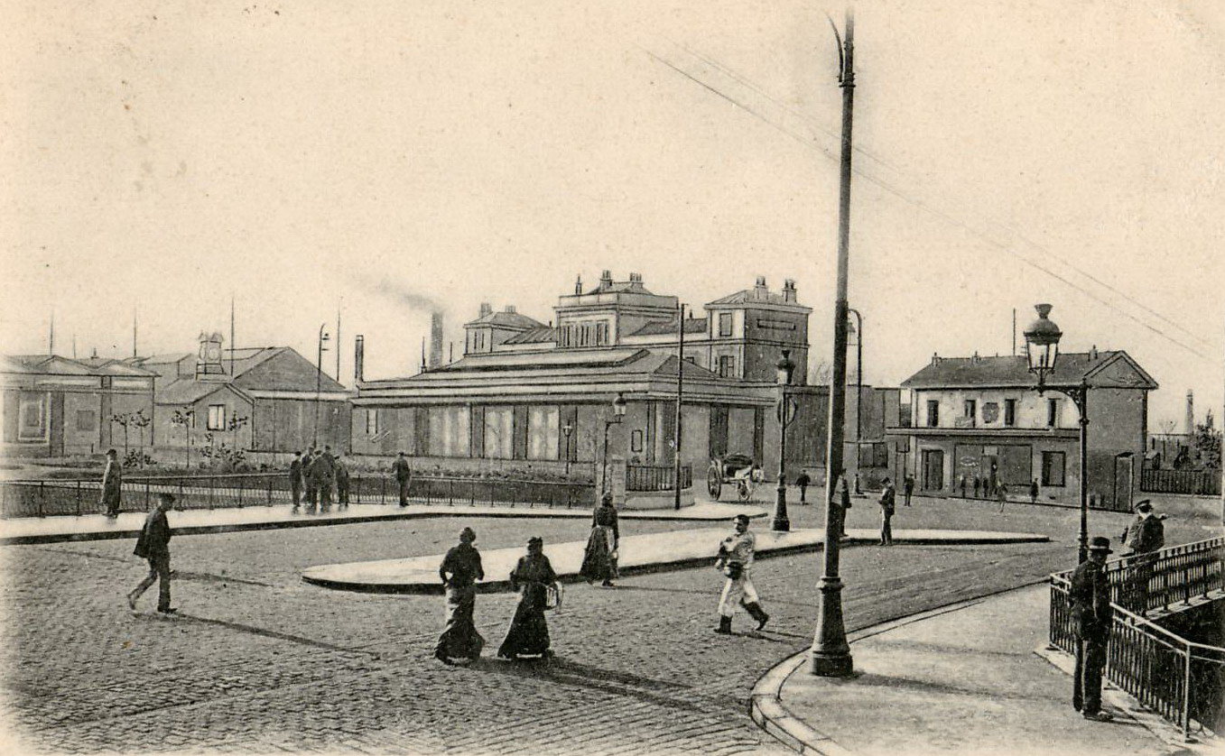 Carte postale ancienne SAINT-DENIS : La gare